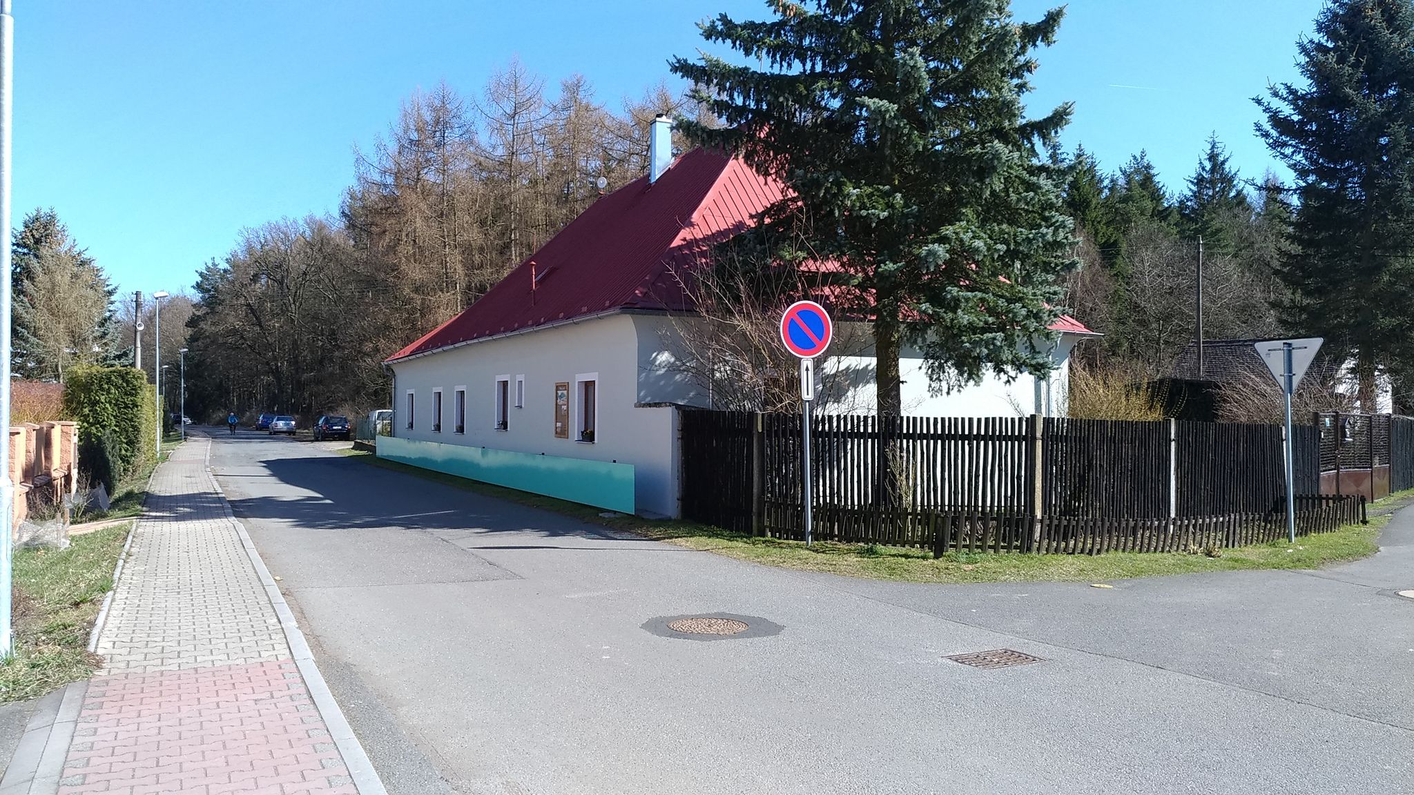 Rekonstruovaná staniční budova koněspřežné dráhy v Lánech, Lesní čp. 10, okres Kladno.